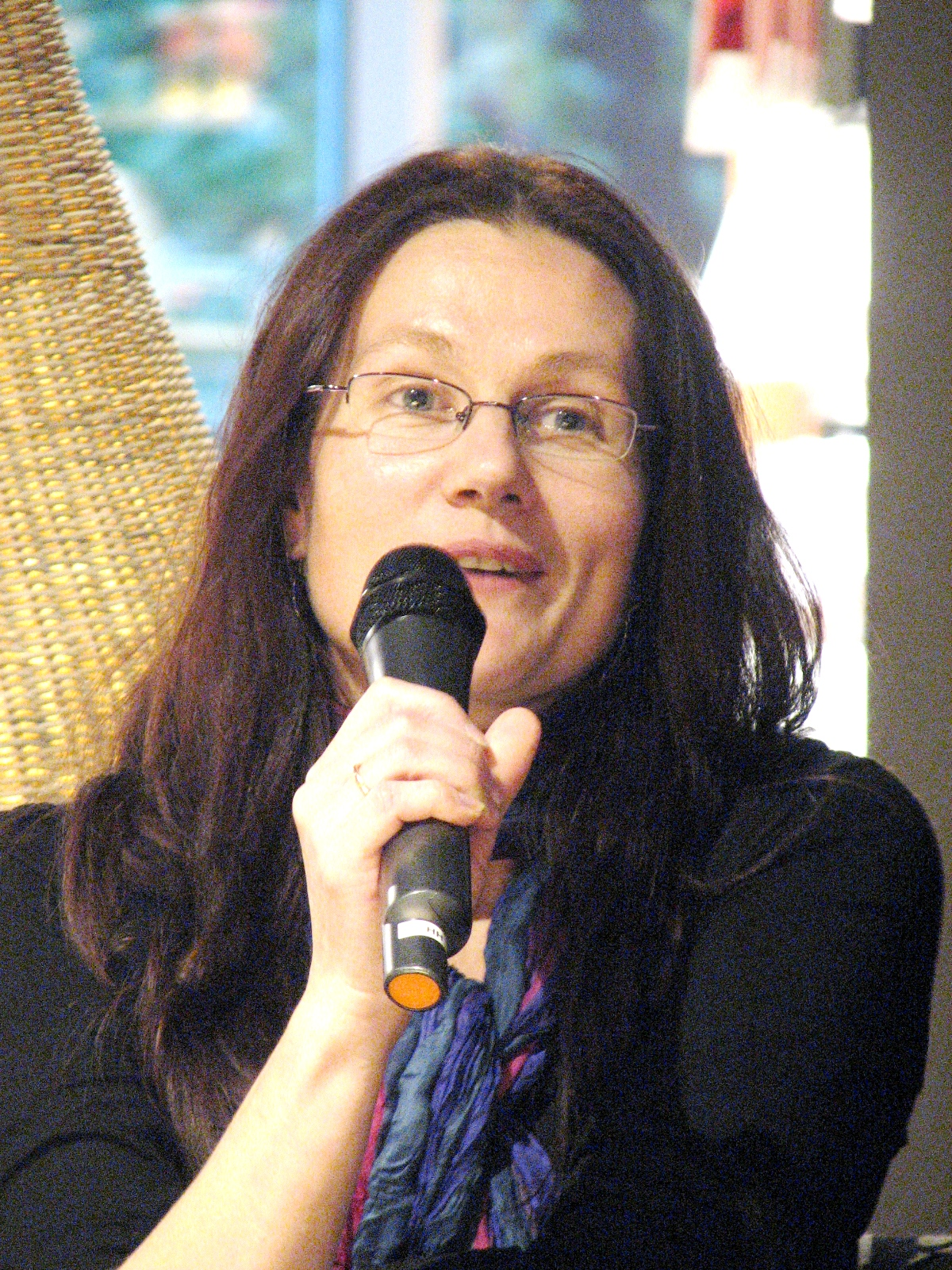 Kai Aareleid esinemas Püha Hieronymuse päeval Apollo raamatupoes Solarise keskuses